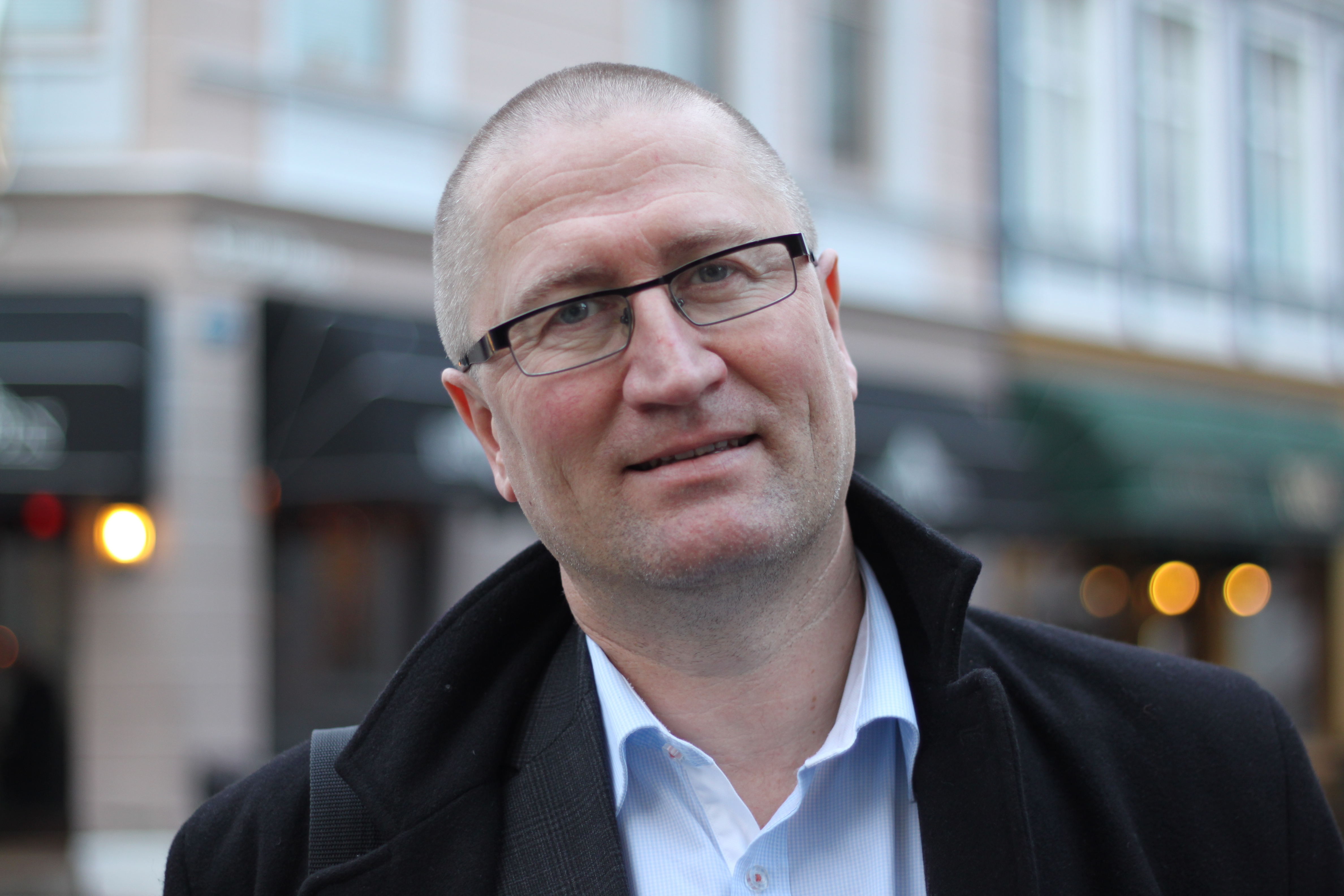 Stortingsrepresentant for KrF